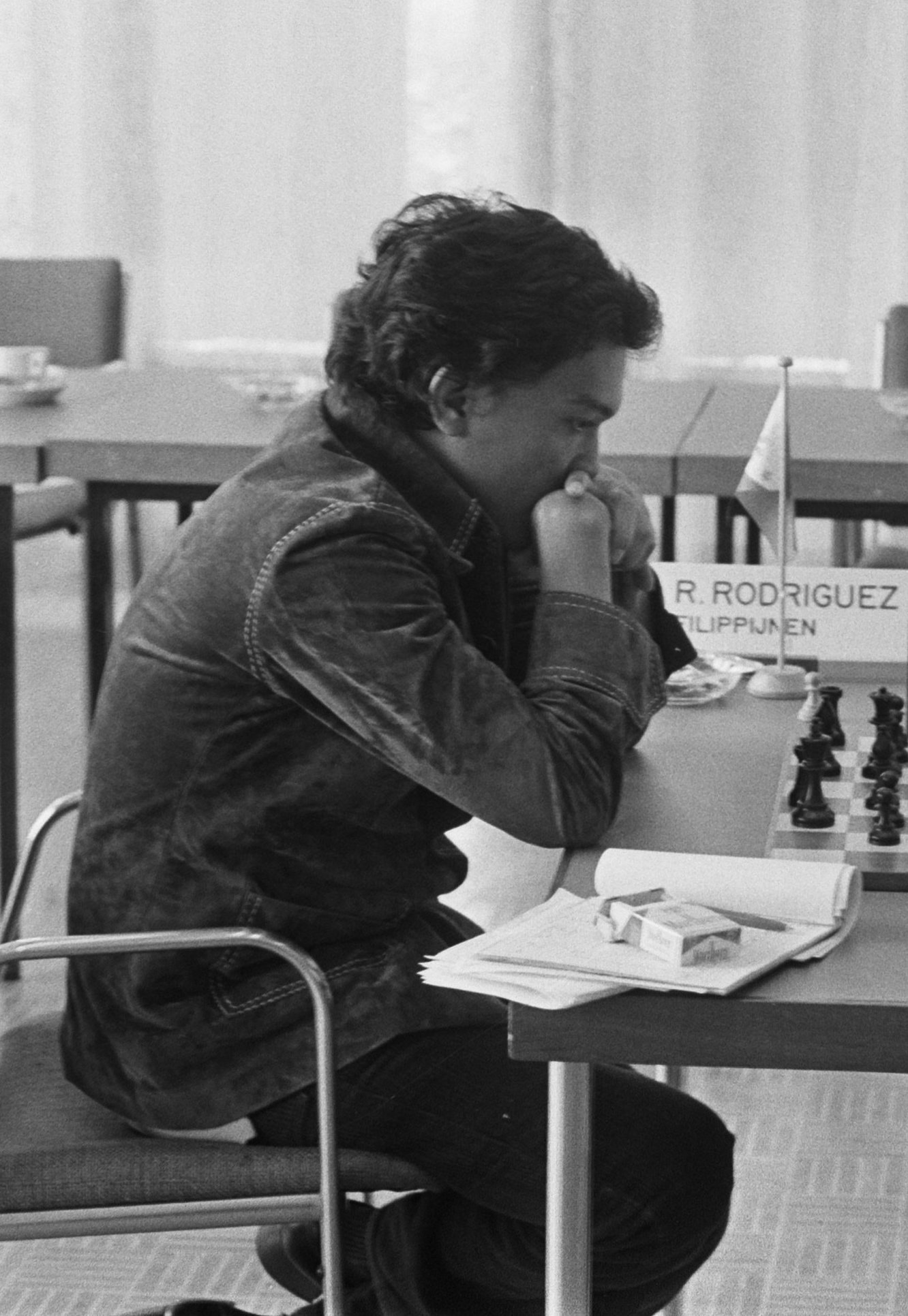 Collectie / Archief : Fotocollectie Anefo Reportage / Serie : IBM-schaaktoernooi 1975 te Amsterdam Beschrijving : Ligterink (r) tegen de Filippijn Rodriguez Annotatie : Randnummer negatiefstrook: nr 10A Timman Datum : 21 juli 1975 Trefwoorden : schaken, toernooien Persoonsnaam : Ligterink, Gert Instellingsnaam : IBM-Schaaktoernooi Fotograaf : Fotograaf Onbekend / Anefo Auteursrechthebbende : Nationaal Archief Materiaalsoort : Negatief (zwart/wit) Nummer archiefinventaris : bekijk toegang 2.24.01.05 Bestanddeelnummer : 928-0614